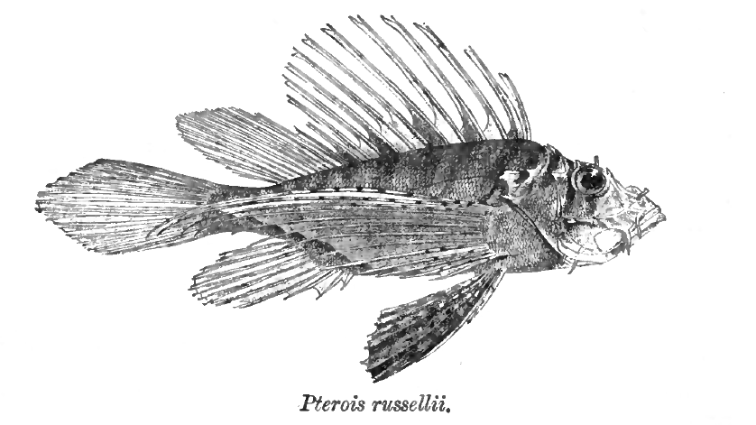 Pterois russellii Bennett, 1831